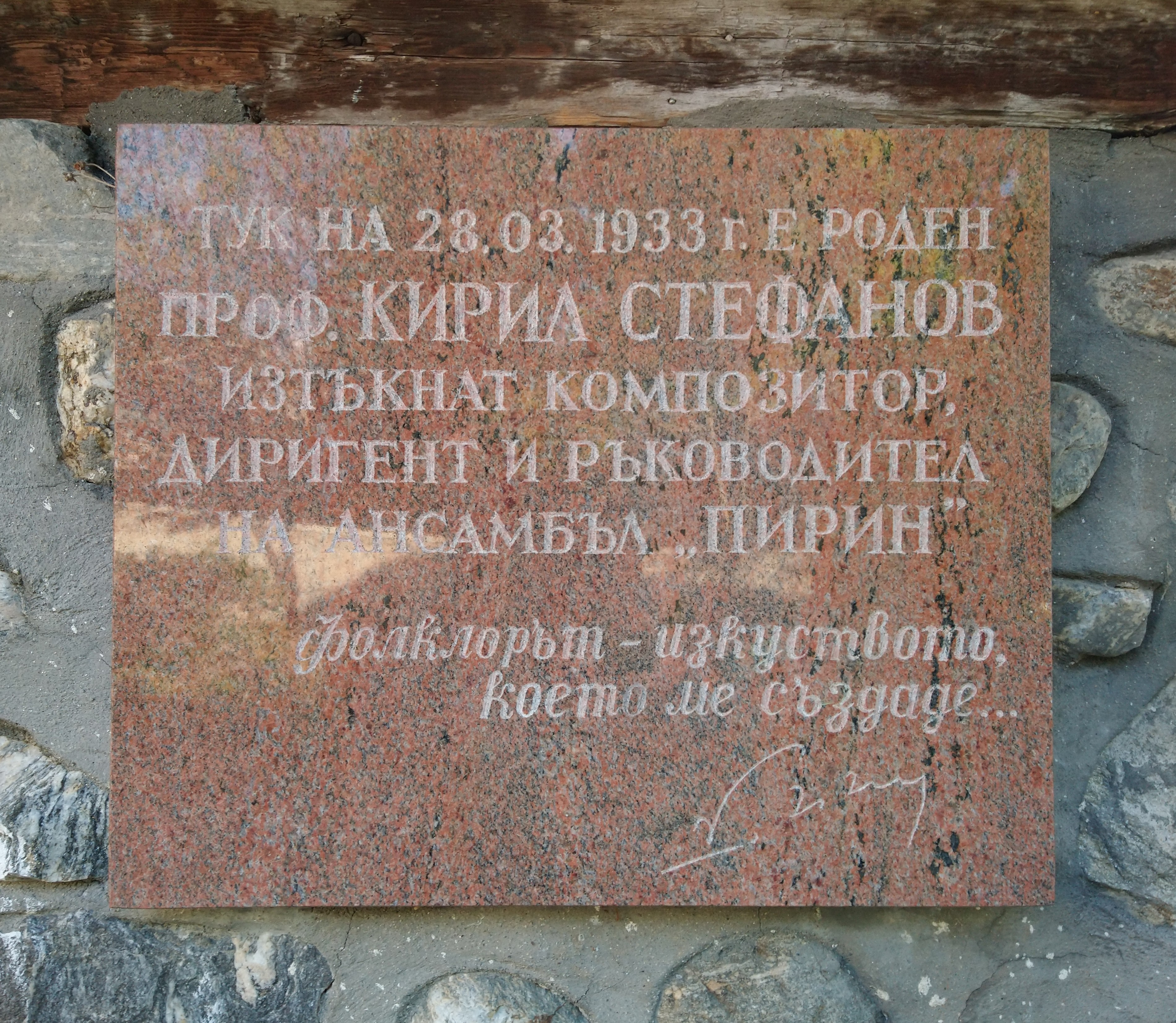 Паметна плоча на композитора Кирил Стефанов на входа на родния му дом във Вароша, Благоевград